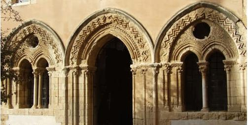 Agrigento church